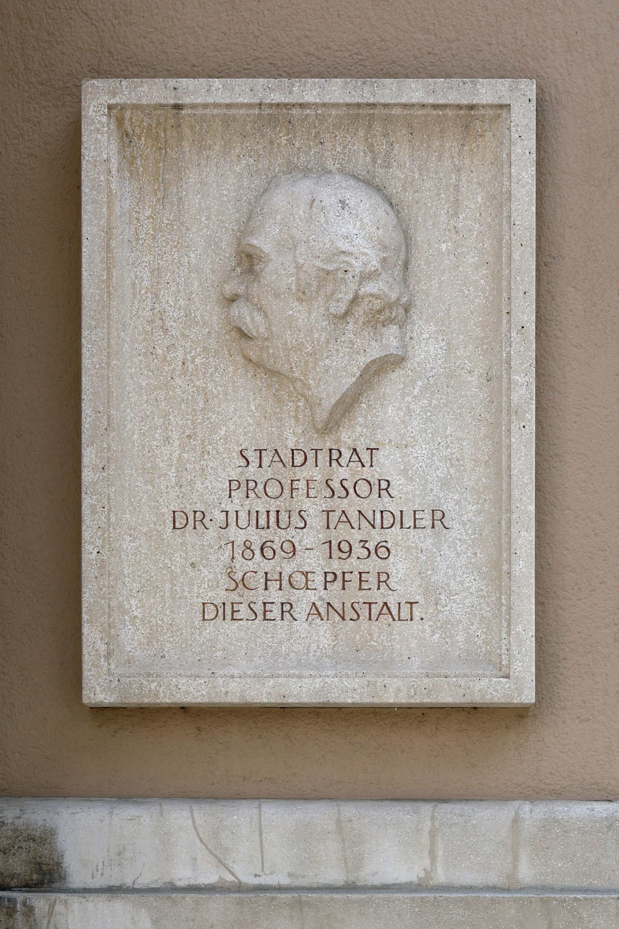 Gedenktafel für Julius Tandler beim Portal des Julius-Tandler-Familienzentrums an der Ecke Lustkandlgasse/Ayrenhoffgasse im 9. Wiener Gemeindebezirk Alsergrund. Das Familienzentrum wurde ab 1923 auf Initiative von Stadtrat Julius Tandler nach Plänen von Adolf Stöckl errichtet und am 18. Juni 1925 als Kinderübernahmestelle der Stadt Wien eröffnet.